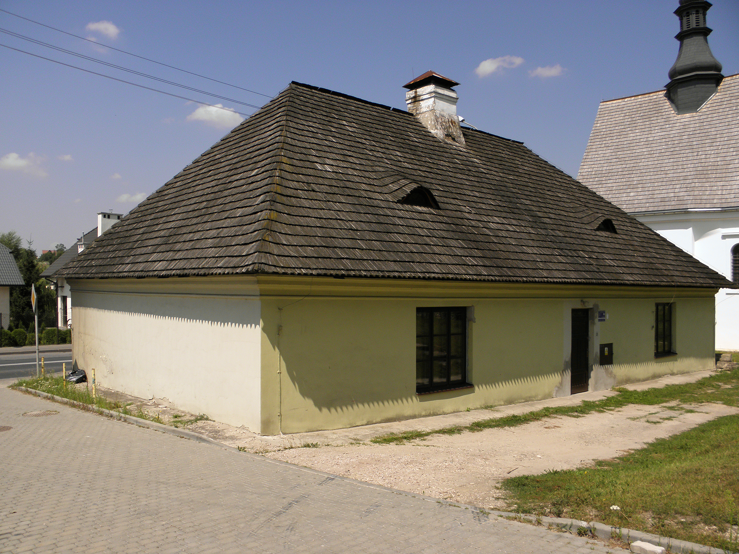 Iłża - budynek dawnego szpitala św.Ducha, obecnie Muzeum Regionalne.